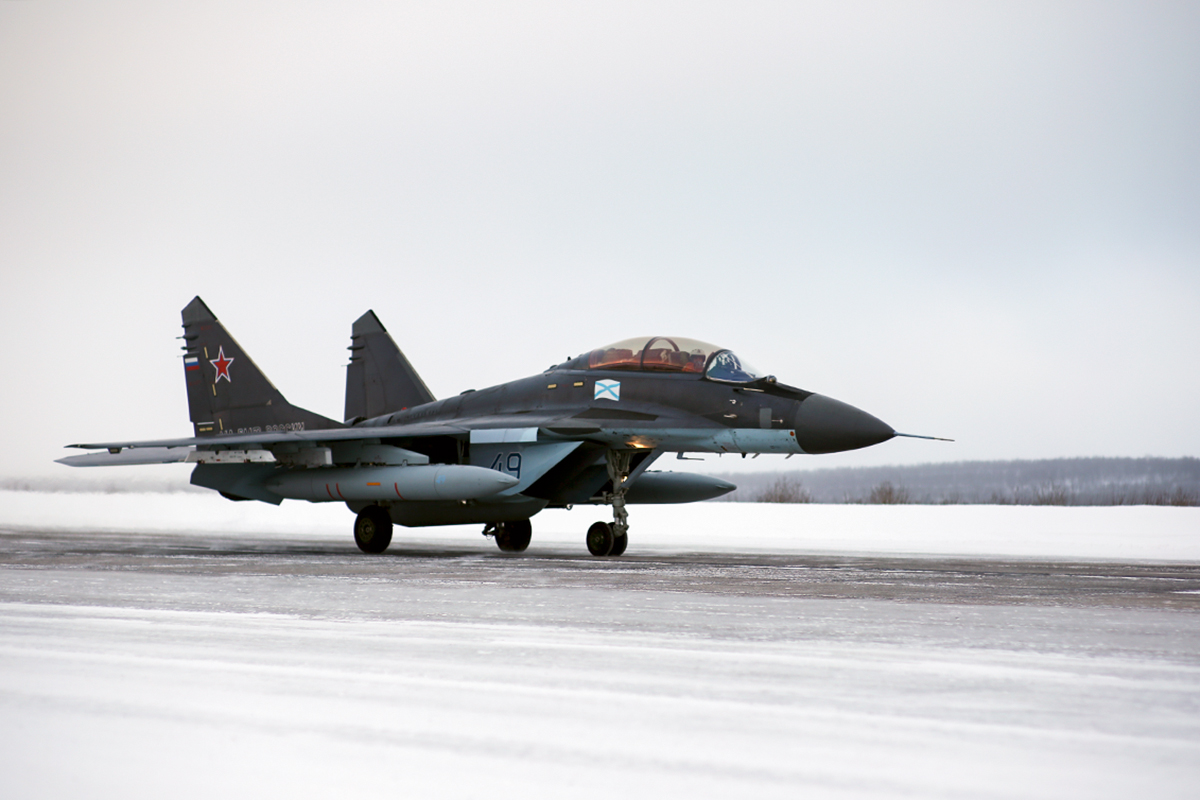 Возвращение самолетов и вертолетов палубной авиации Северного флота с тяжелого авианесущего крейсера «Адмирал Кузнецов» на аэродром в Североморске